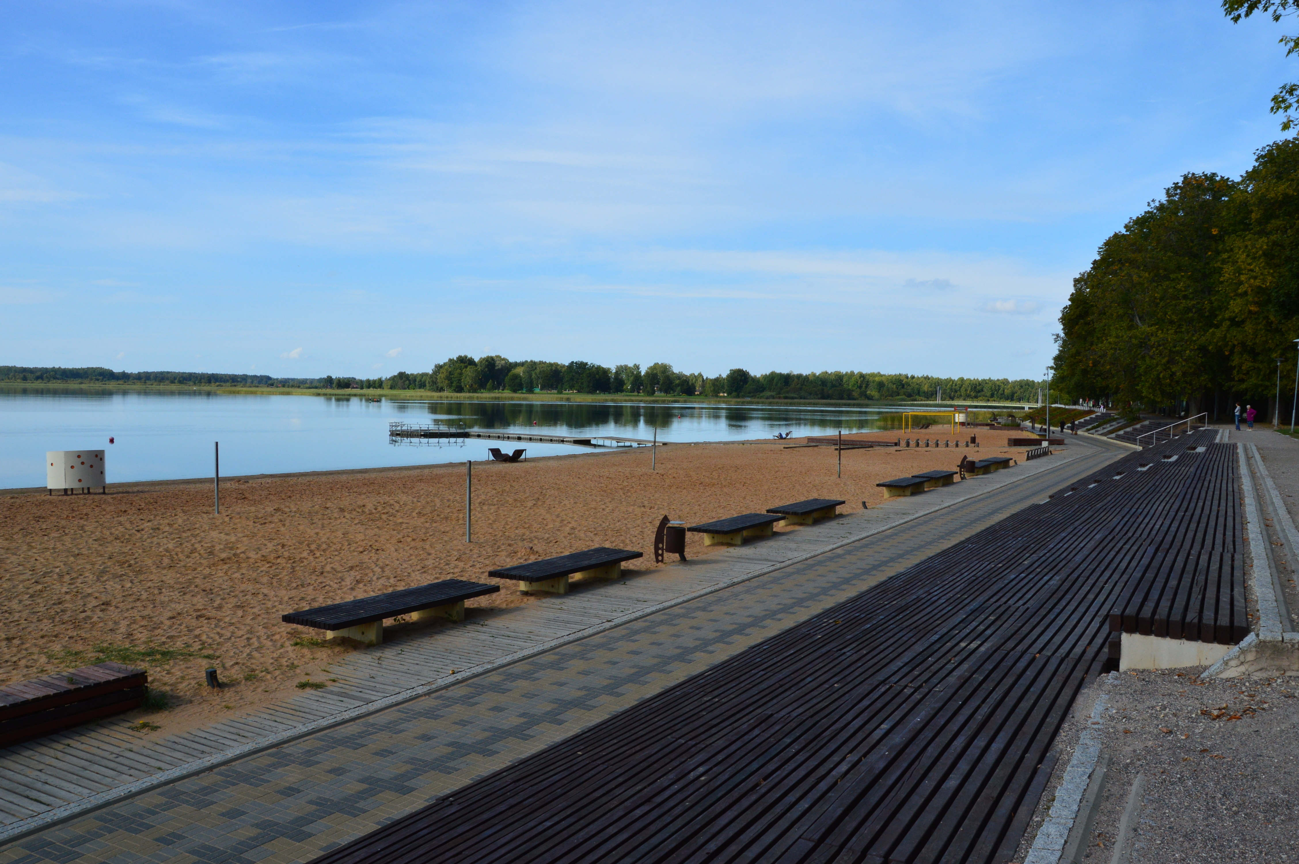 Tamula järv